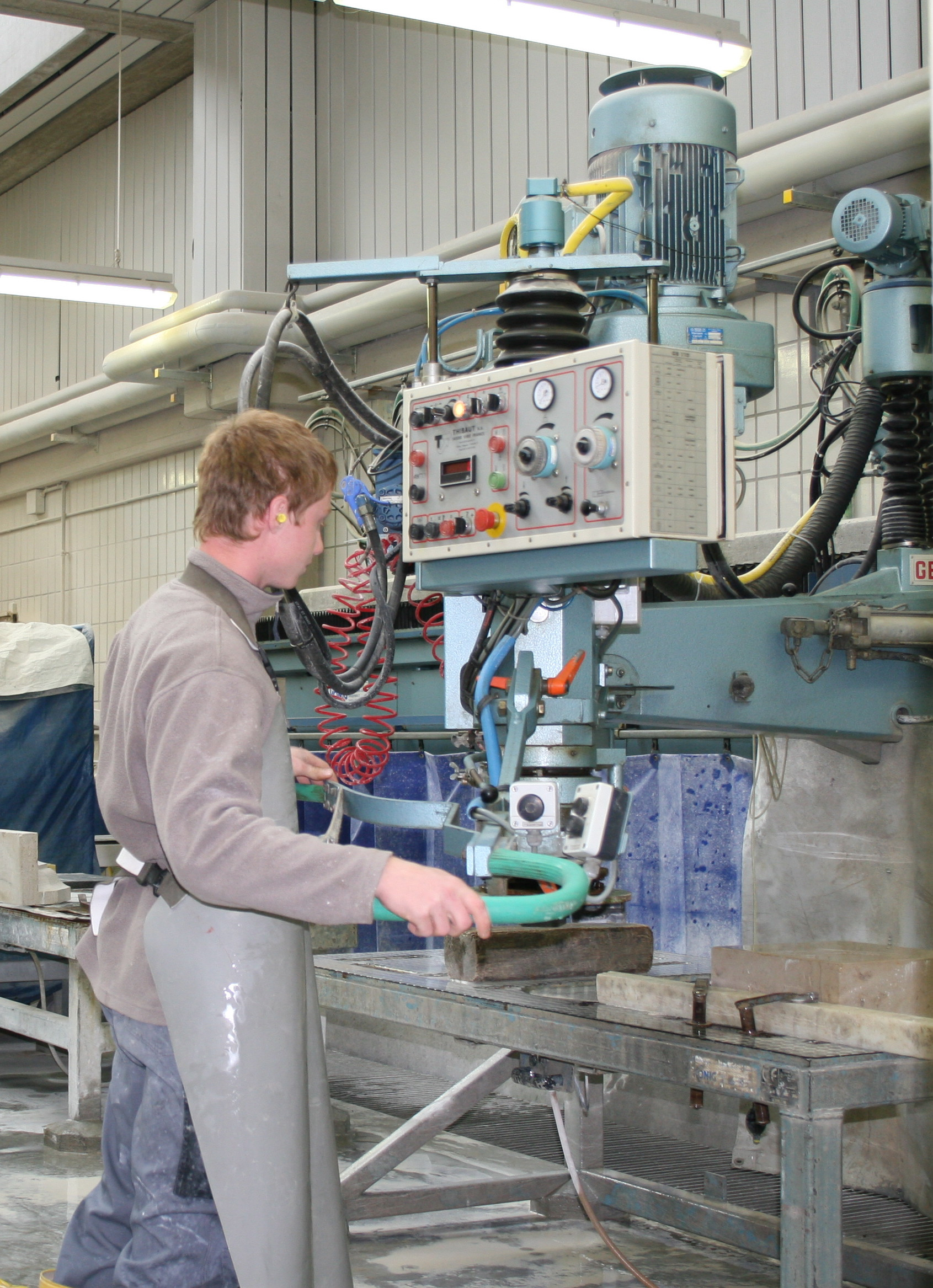 Gelenkarmschleifmaschine